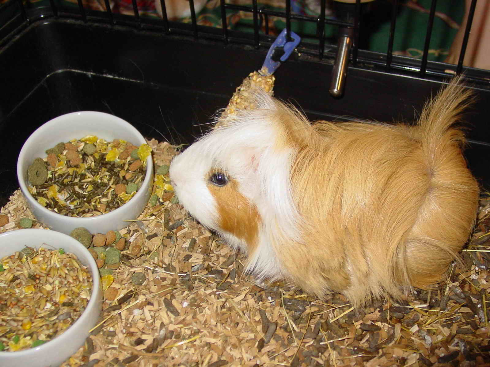 Foto tirada cunha Nikon E8800